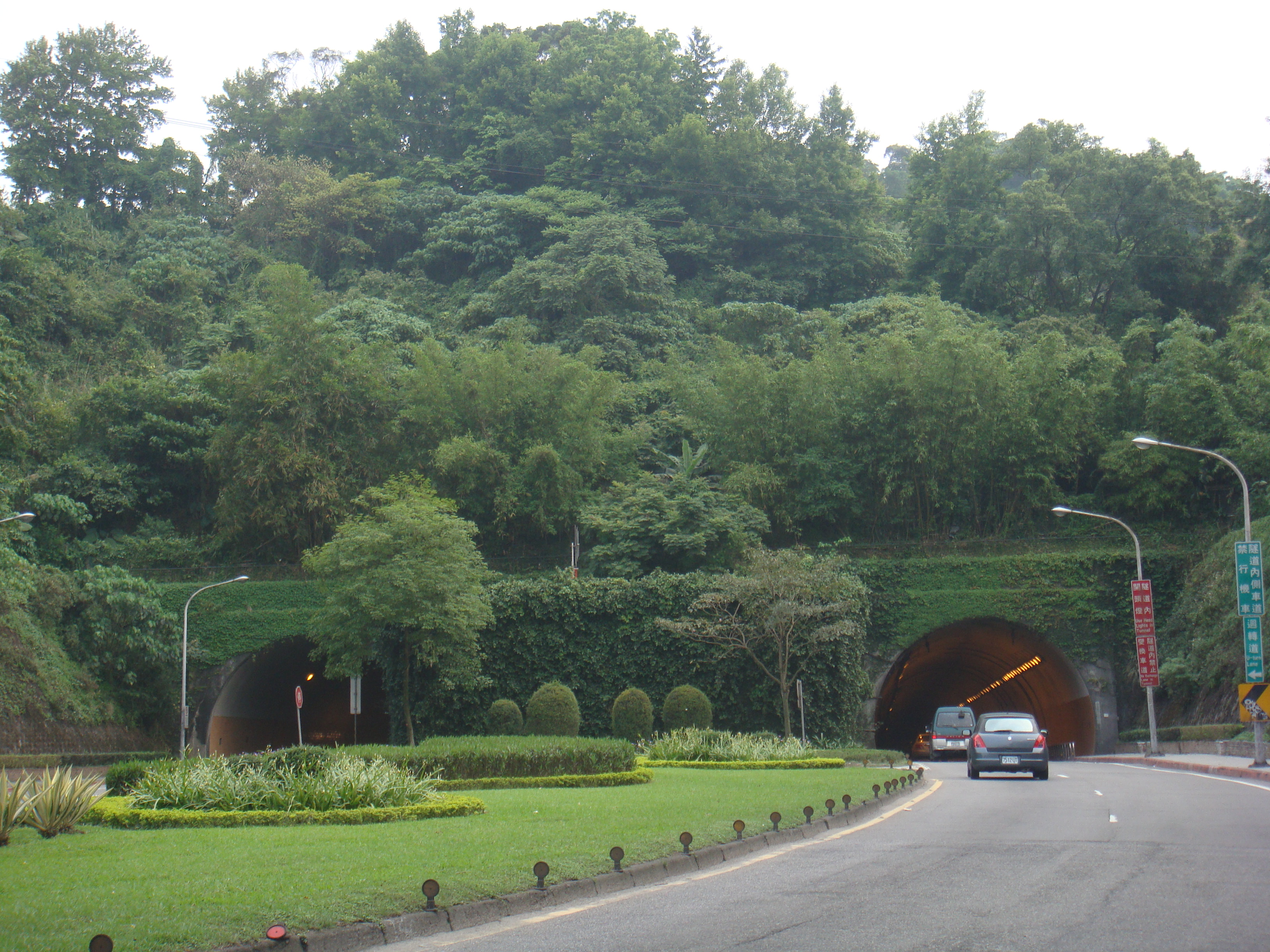 懷恩隧道西端入口